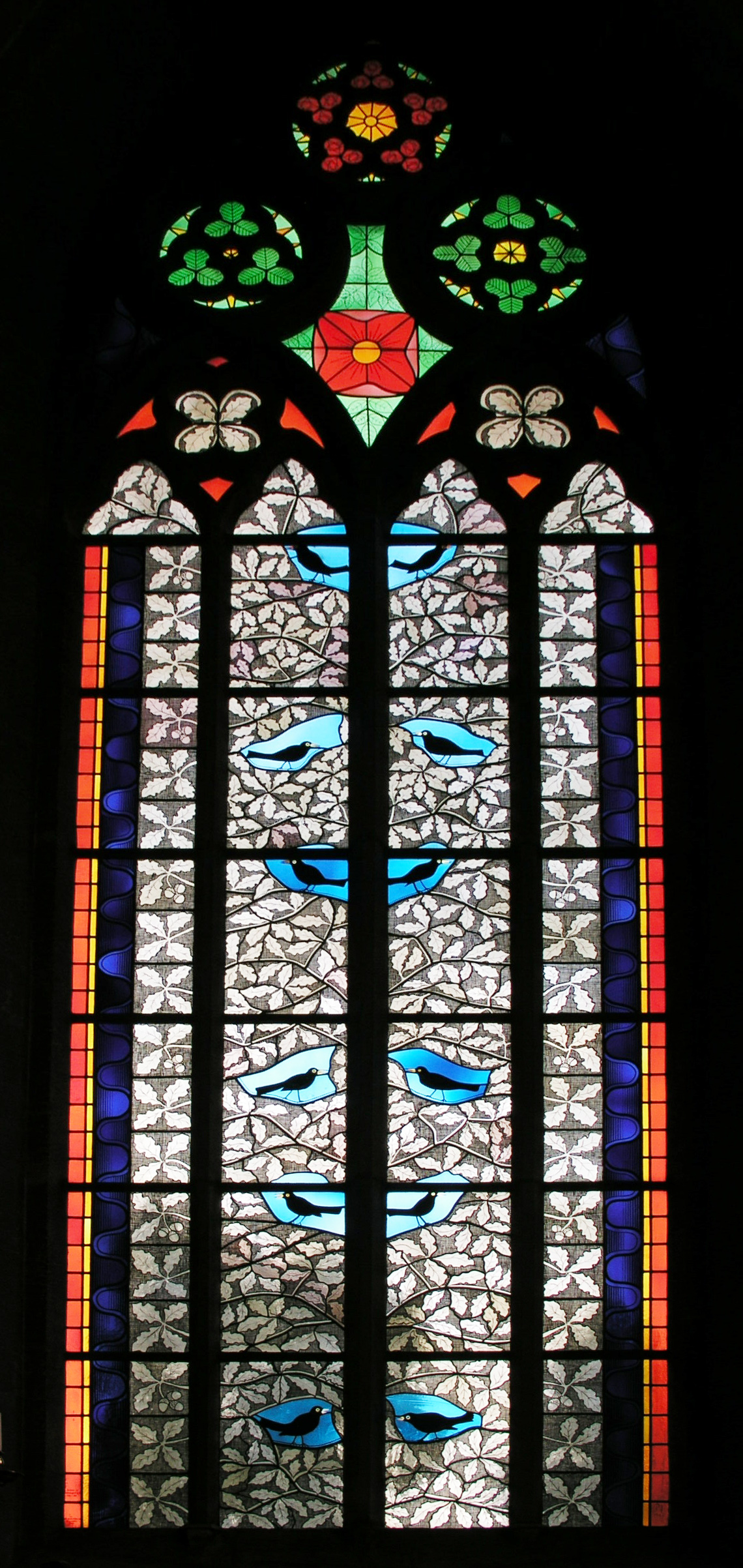 Cathedral Visby Sankta Maria / Visby Sankta Maria domkyrka